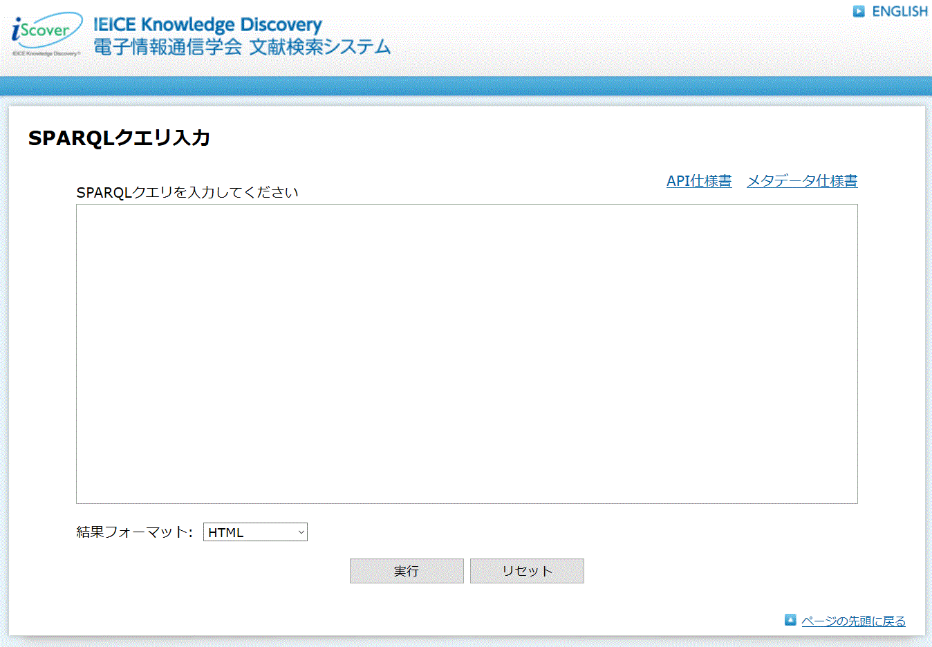 I-Scover SPARQL APIの検索インタフェース